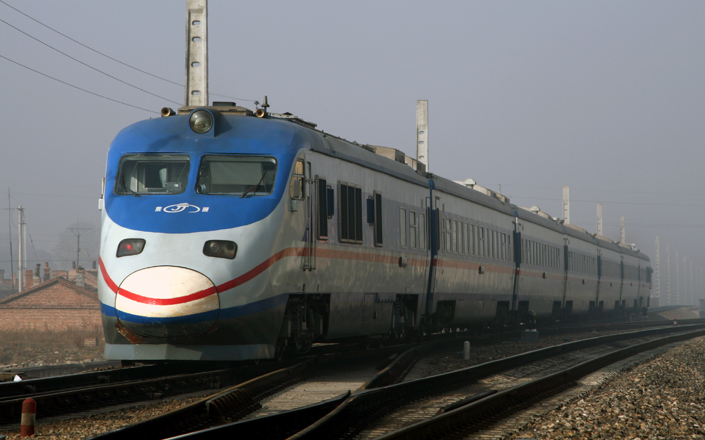 NYJ1型“罕露号”柴油动车组行经京包铁路卓资山站